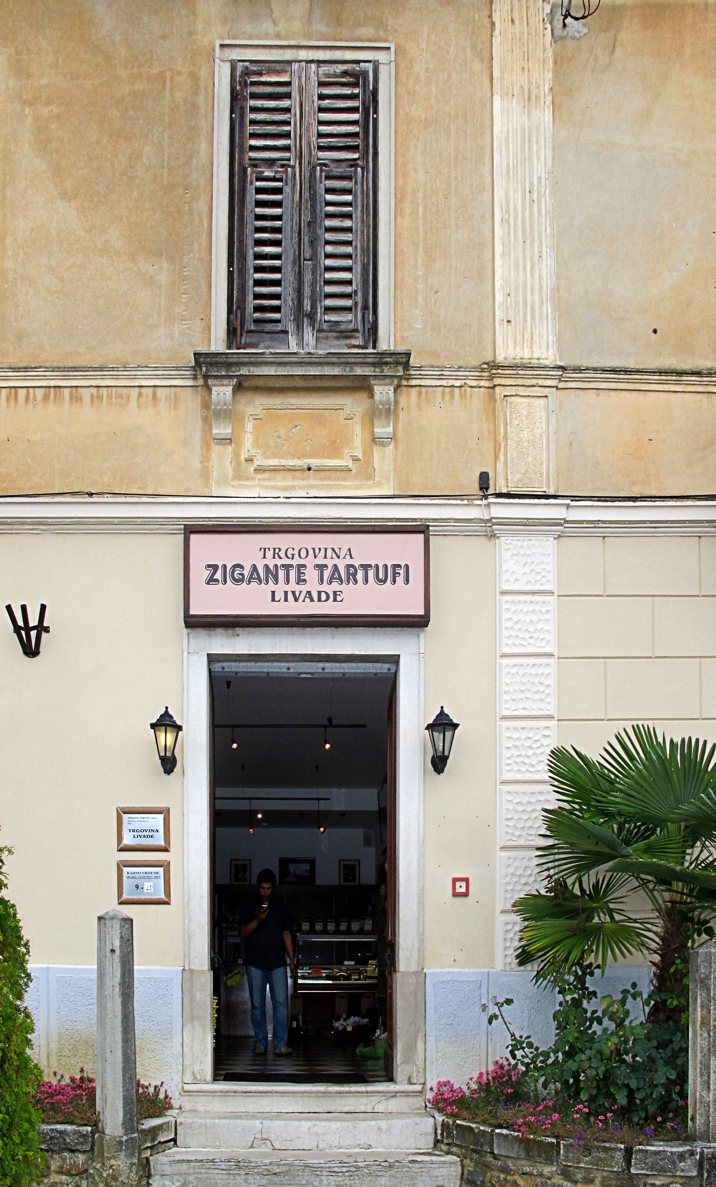 Kroatien, Livade, Eingangsbereich zur Verkaufsstelle von "Zigante Tartufi", einem Trüffel-Spezial-Geschäft